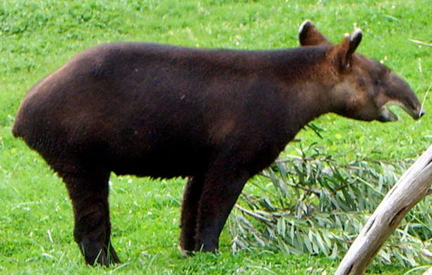 Tapir górski